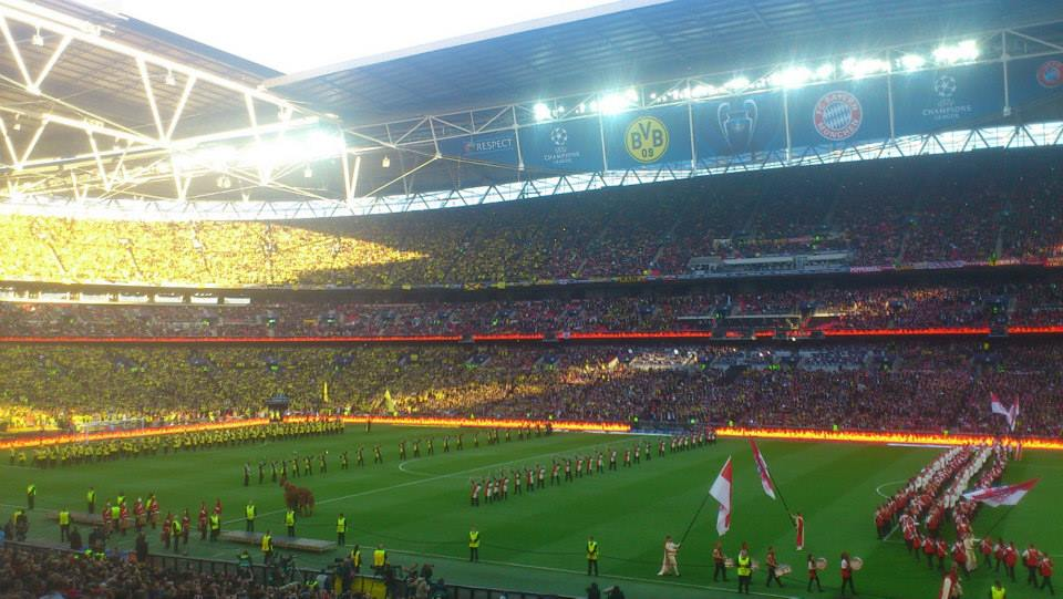 Eröffnungszeremonie des Finales der UEFA Champions League zwischen Borussia Dortmund und dem FC Bayern München 2013 im Londoner Wembley Stadion